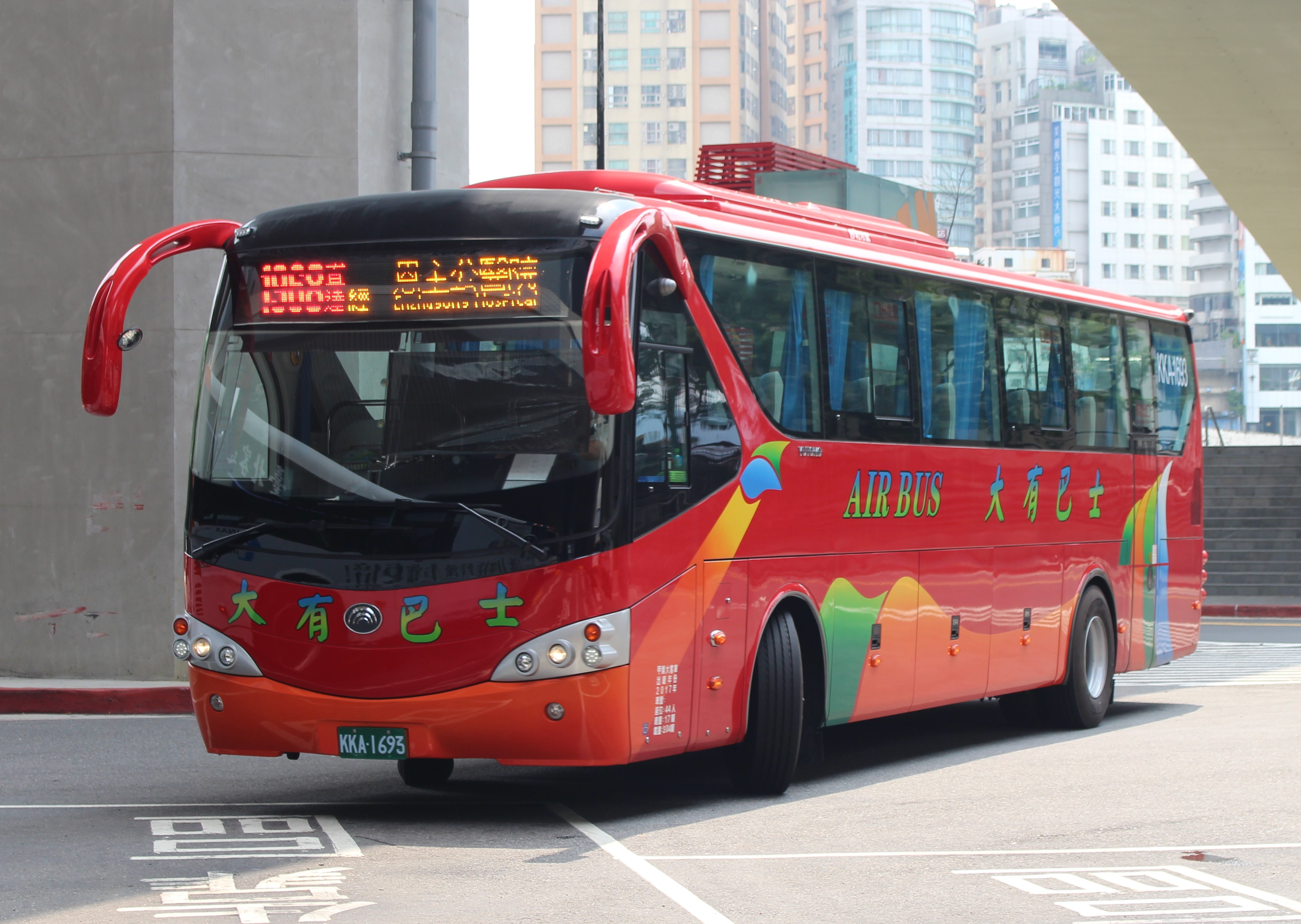 大有巴士2017年宇通ZK6129HC大客車KKA-1693